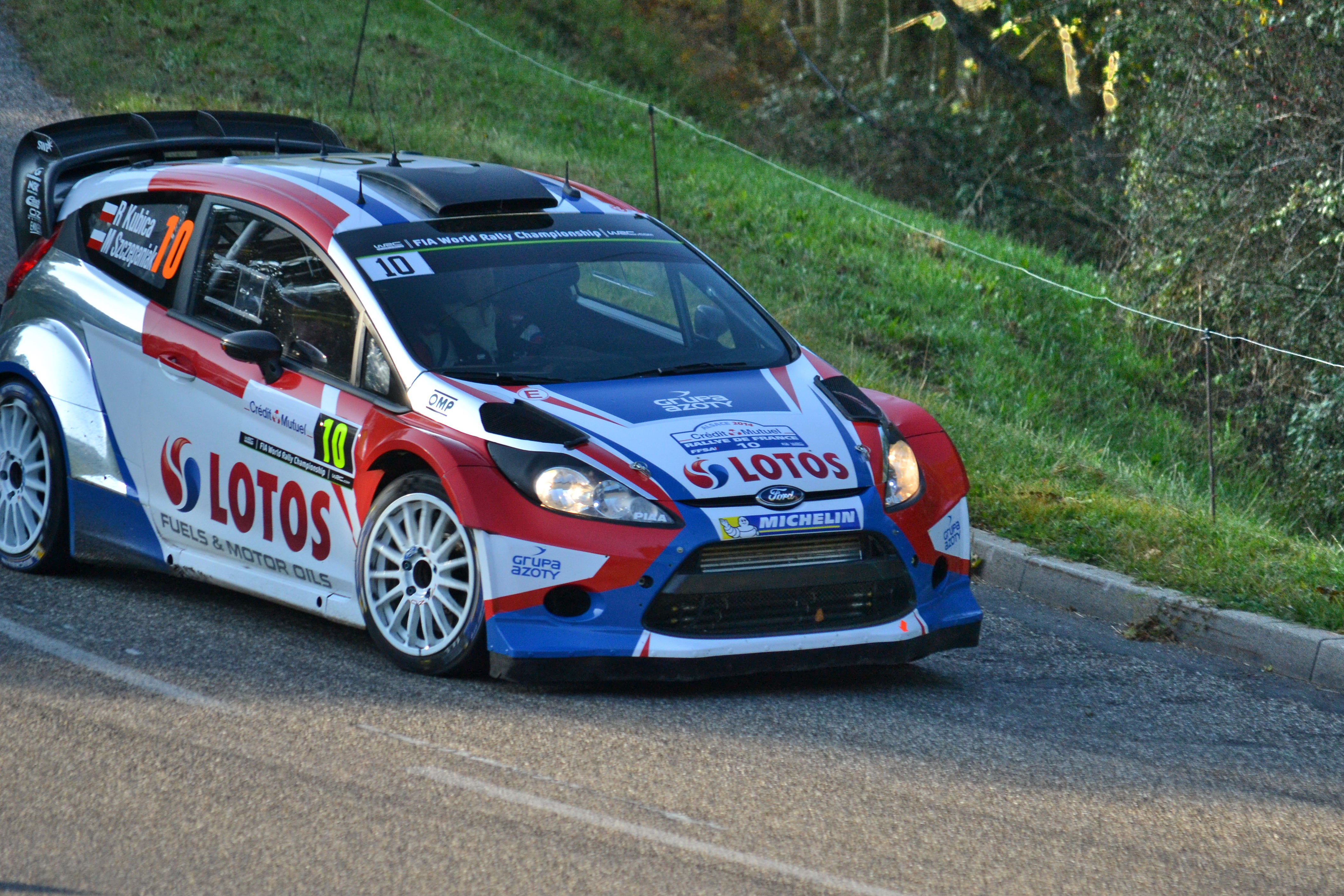 Rallye WRC France-Alsace 2014, ES9 Soultzeren - Le Grand Hohnack 1 à Labaroche. Ford Fiesta RS WRC - Robert Kubica - Maciek Szczepaniak